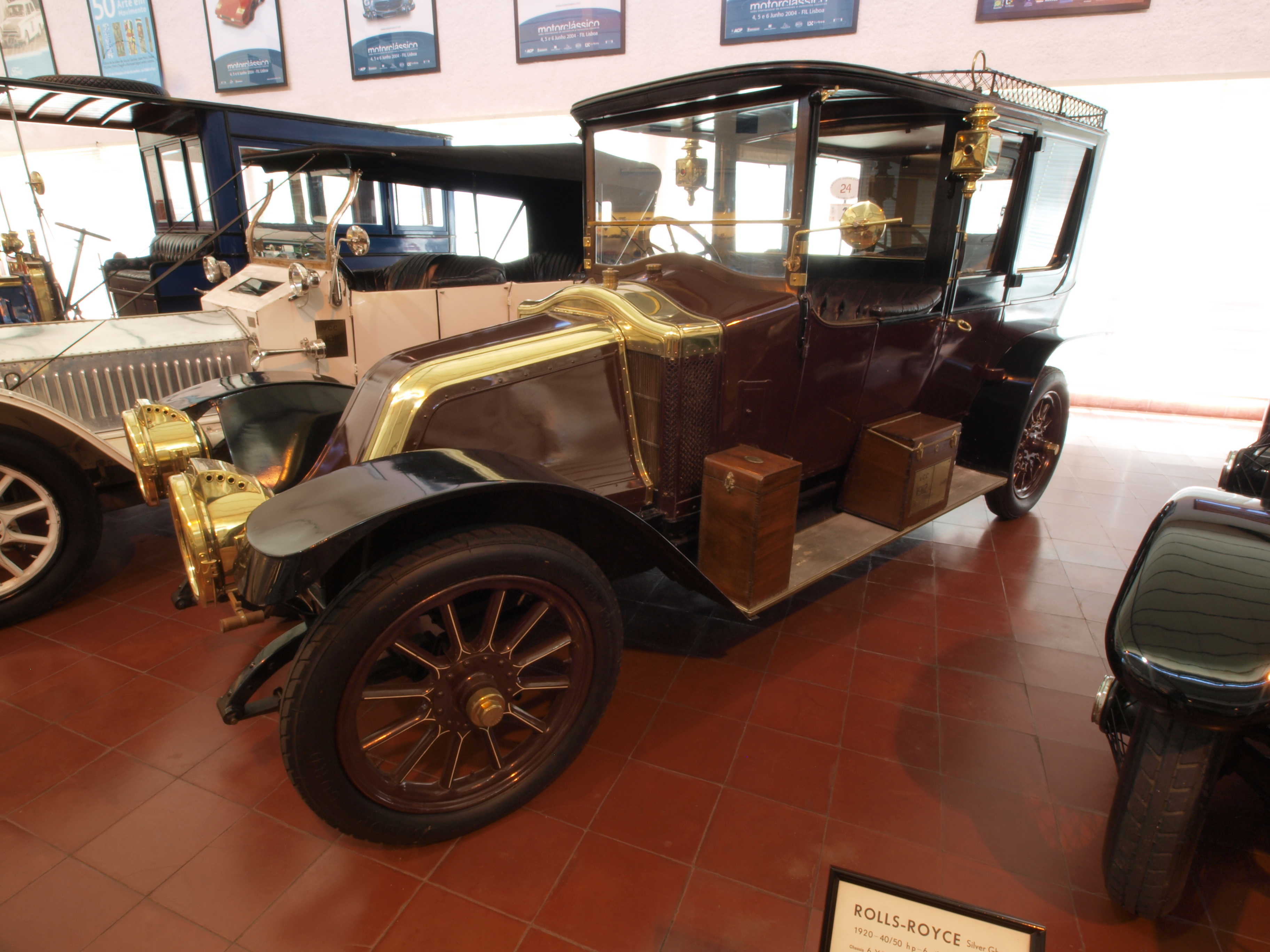 Photographed at the Caramulo museum, 'Museu do Caramulo', Caramulo, Portugal. OLYMPUS DIGITAL CAMERA